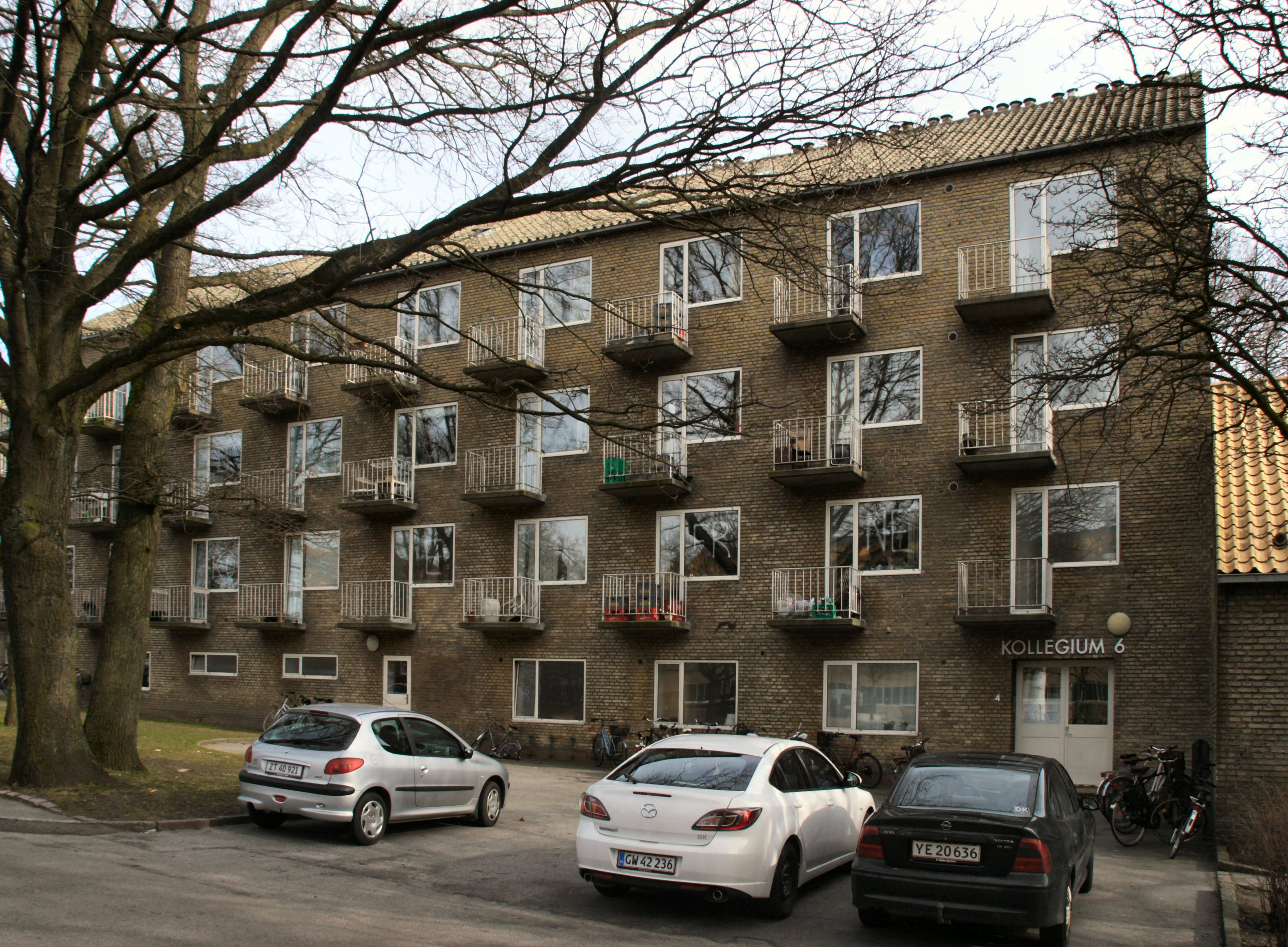 Kollegierne i Universitetsparken i Aarhus ved Langelandsgade, Aarhus, Denmark